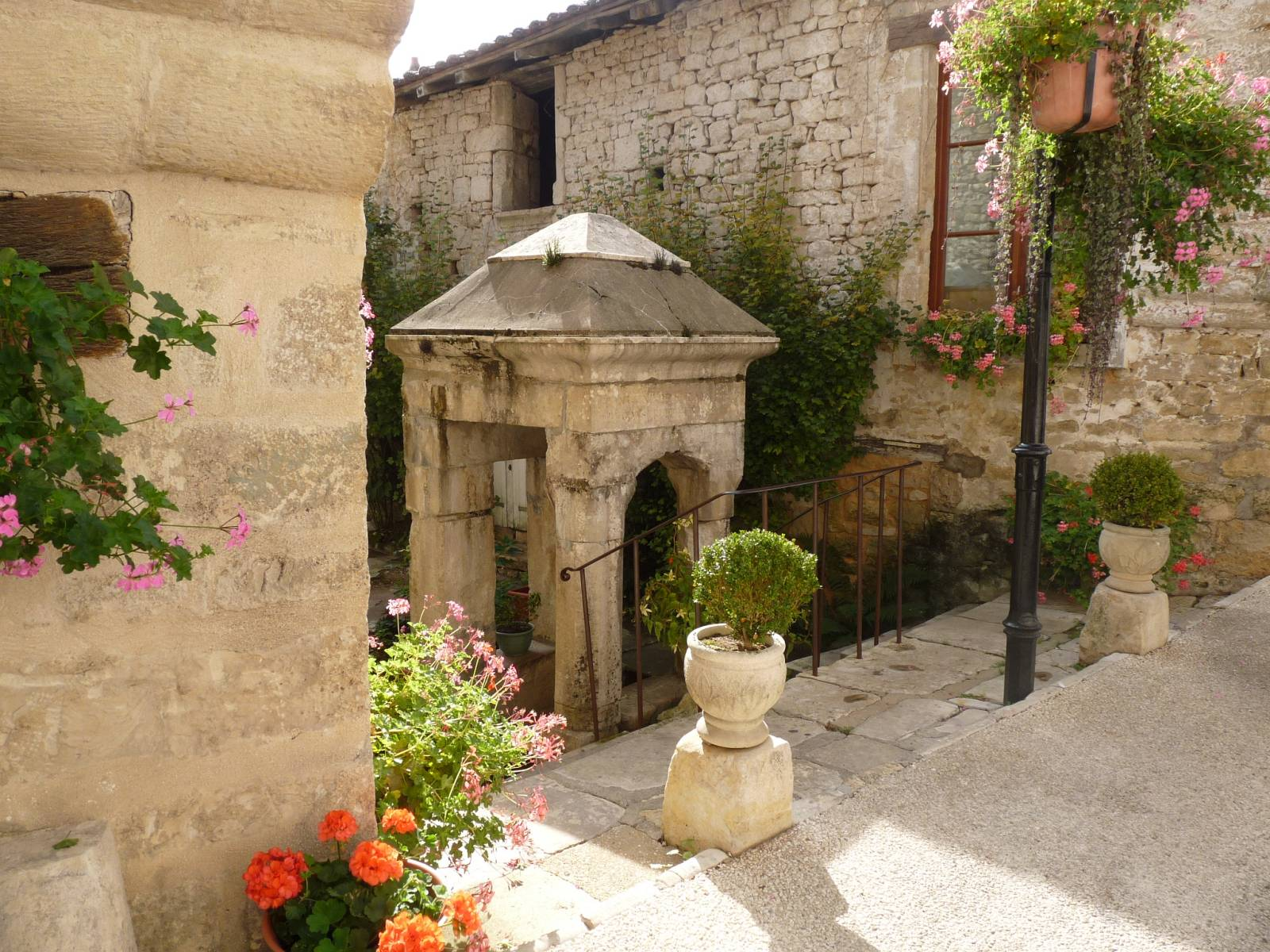 fontaine St-Jean, Nanteuil-en-Vallée, Charente, France